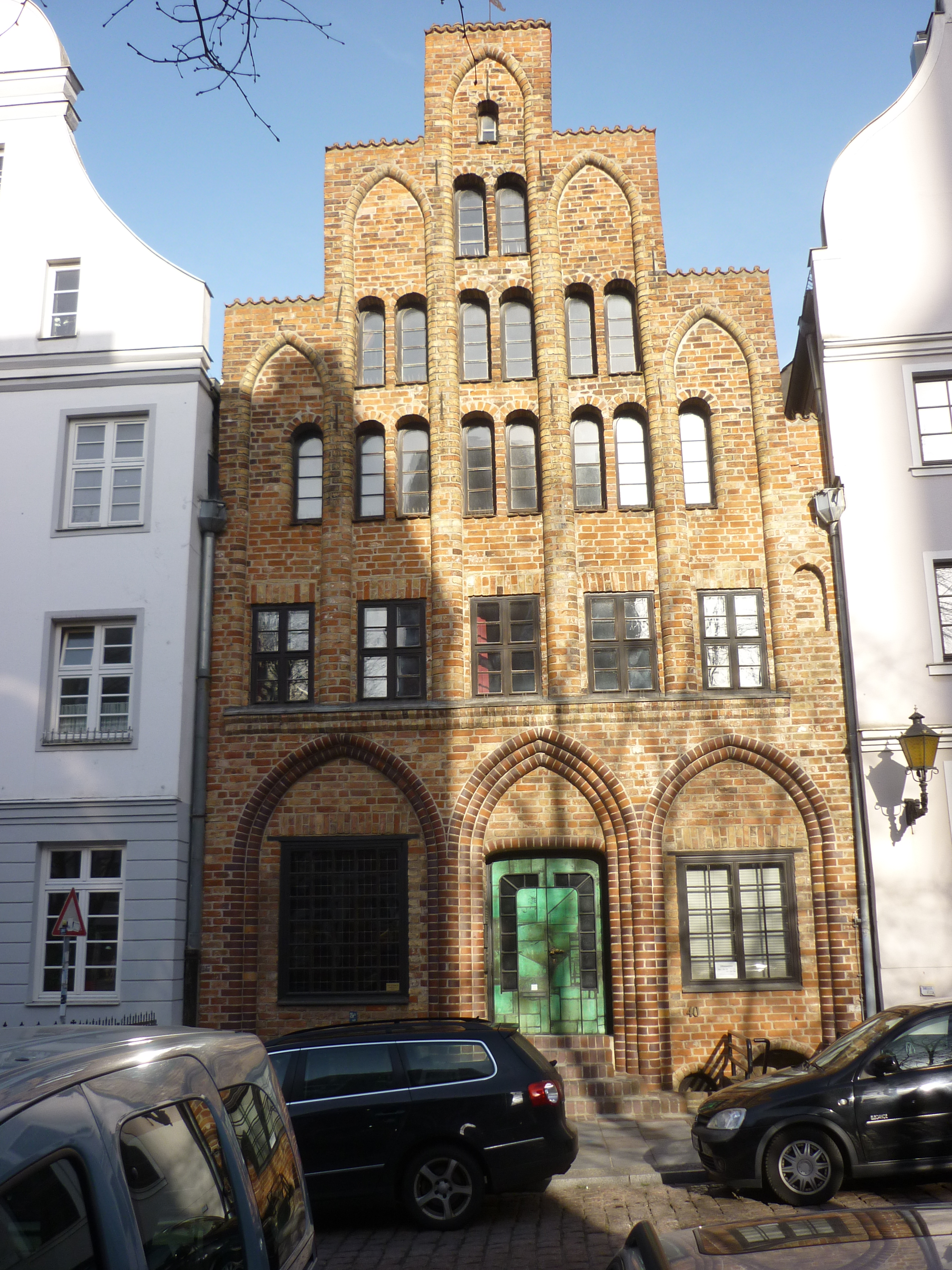 Frontansicht des Haus der Architekten in der Wokrenter Straße 40 in Rostock